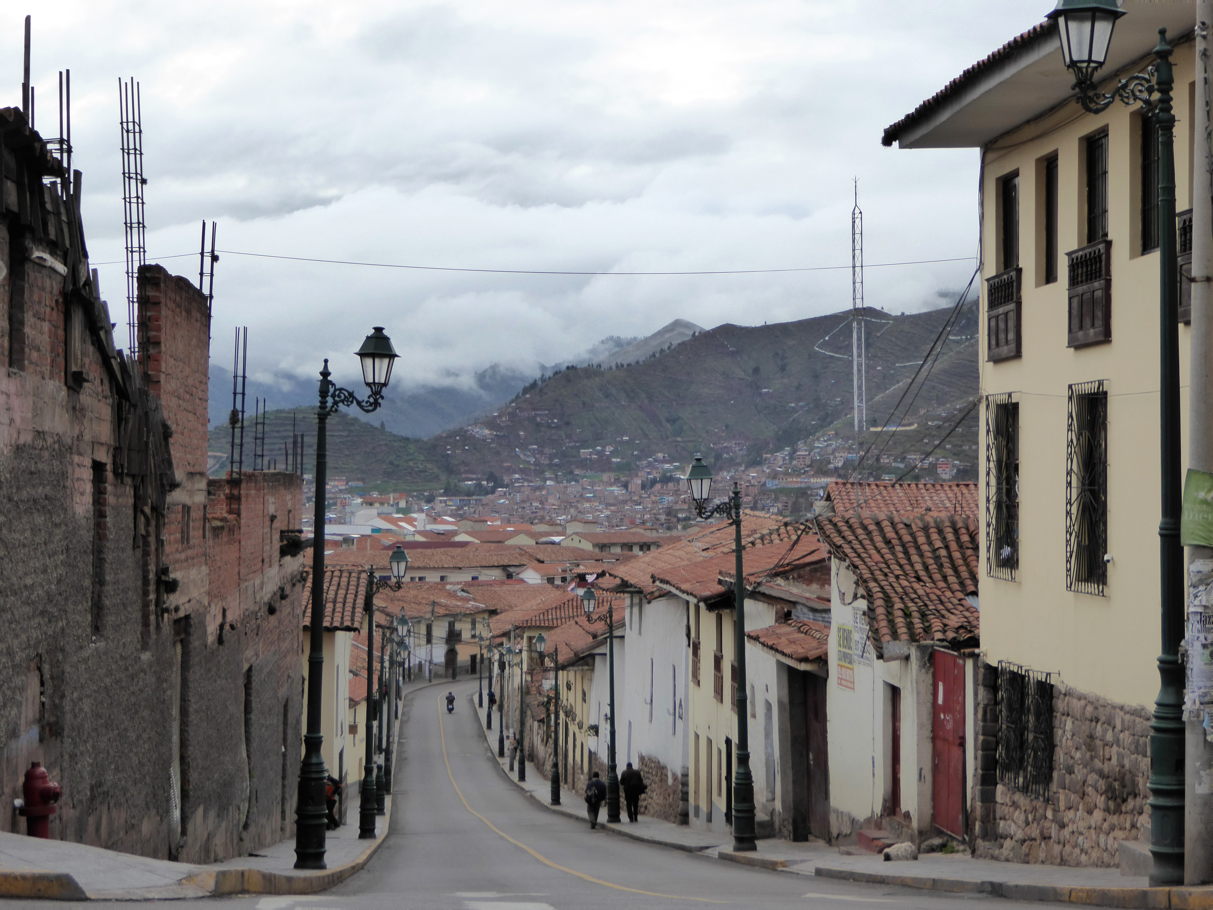 In der Altstadt von Cusco